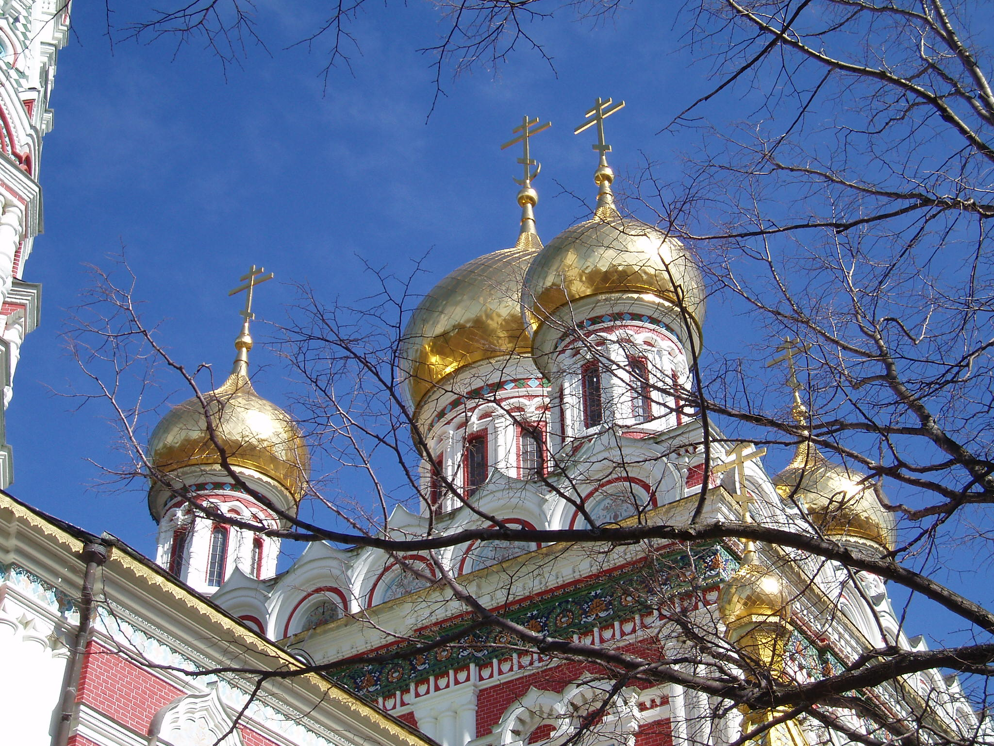 Храм-паметник